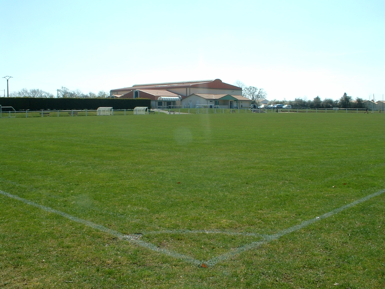 Chauvé (France) - Complexe sportif